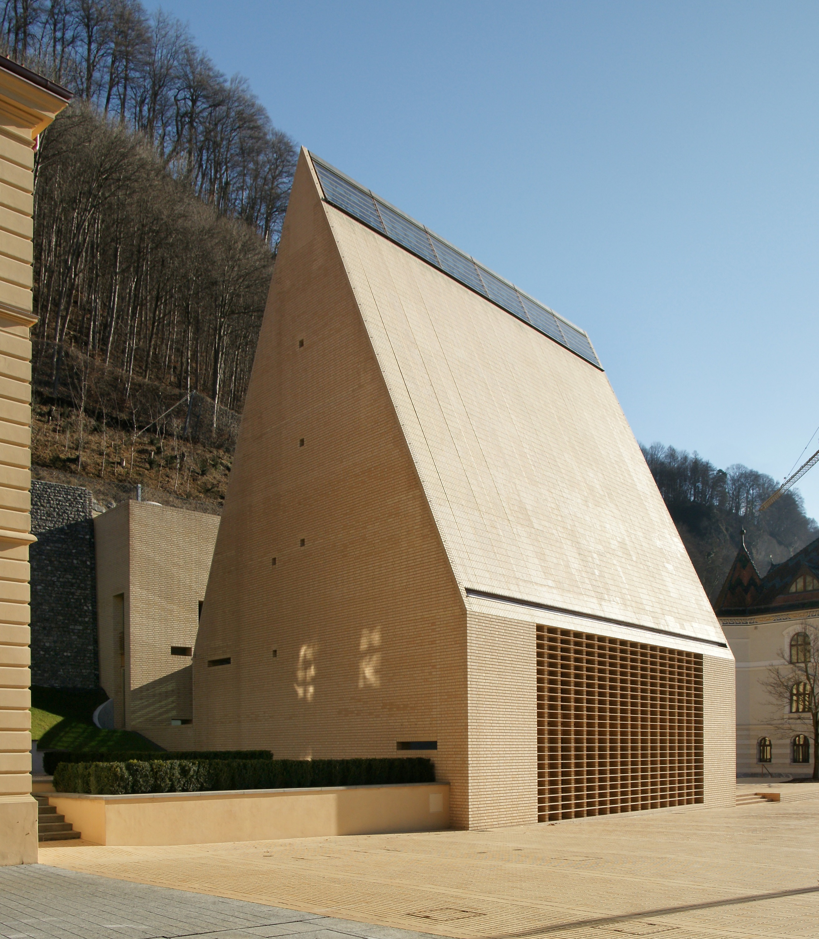 Details: Hohes Haus und Langes Haus des Liechtensteinischen Landtags in Vaduz erbaut 2007. Architekt Hansjörg Göritz.